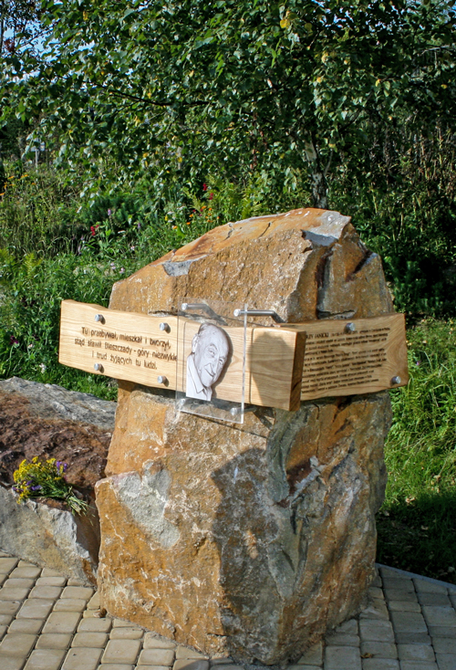 Tablica pamiątkowa